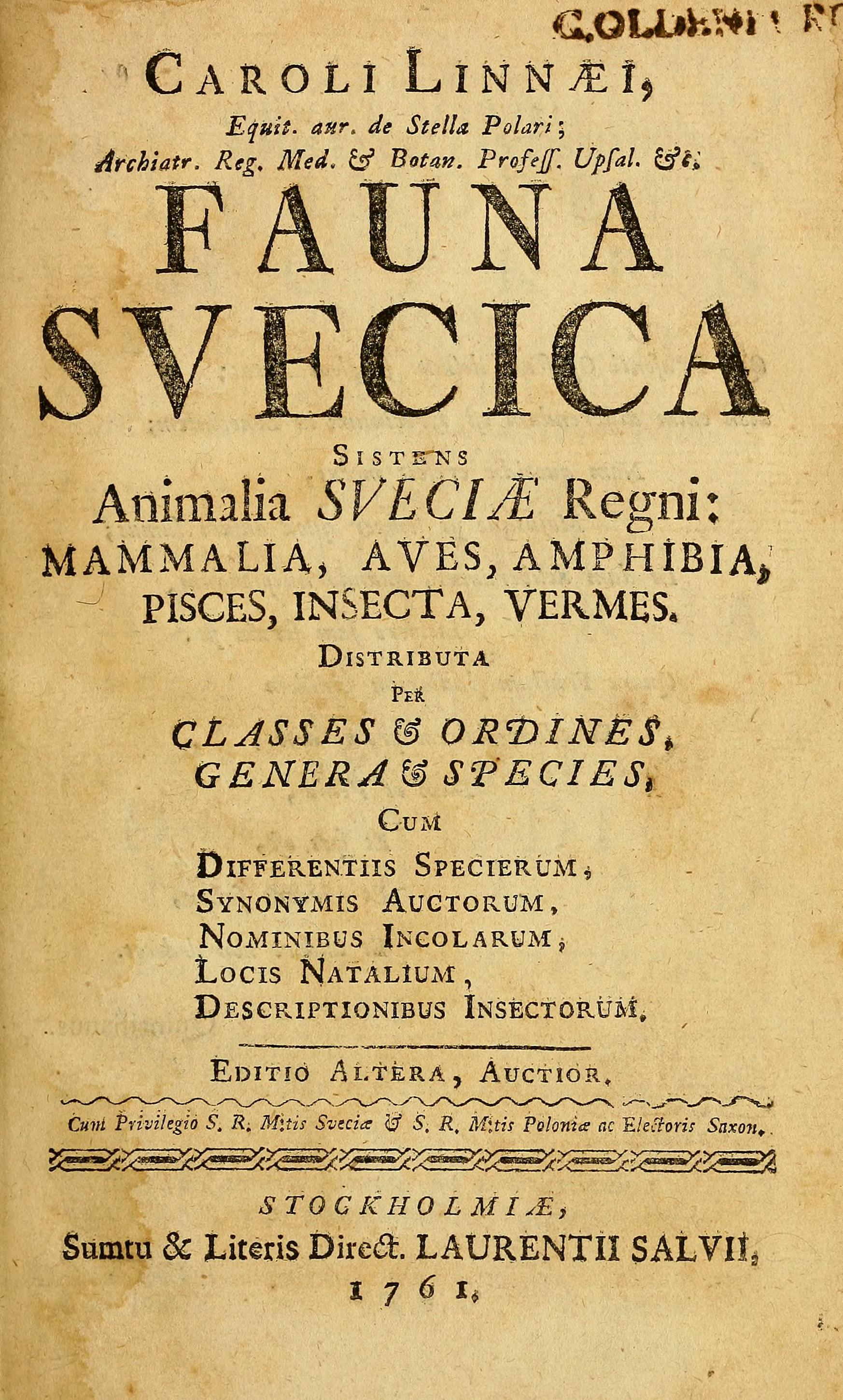 Fauna svecica : sistens animalia sveciae regni: mammalia, aves, amphibia, pisces, insecta, vermes, distributa per classes & ordines, genera & species, cum differentiis specierum, synonymis auctorum, nominibus incolarum, locis natalium, descriptionibus insectorum (Second edition)